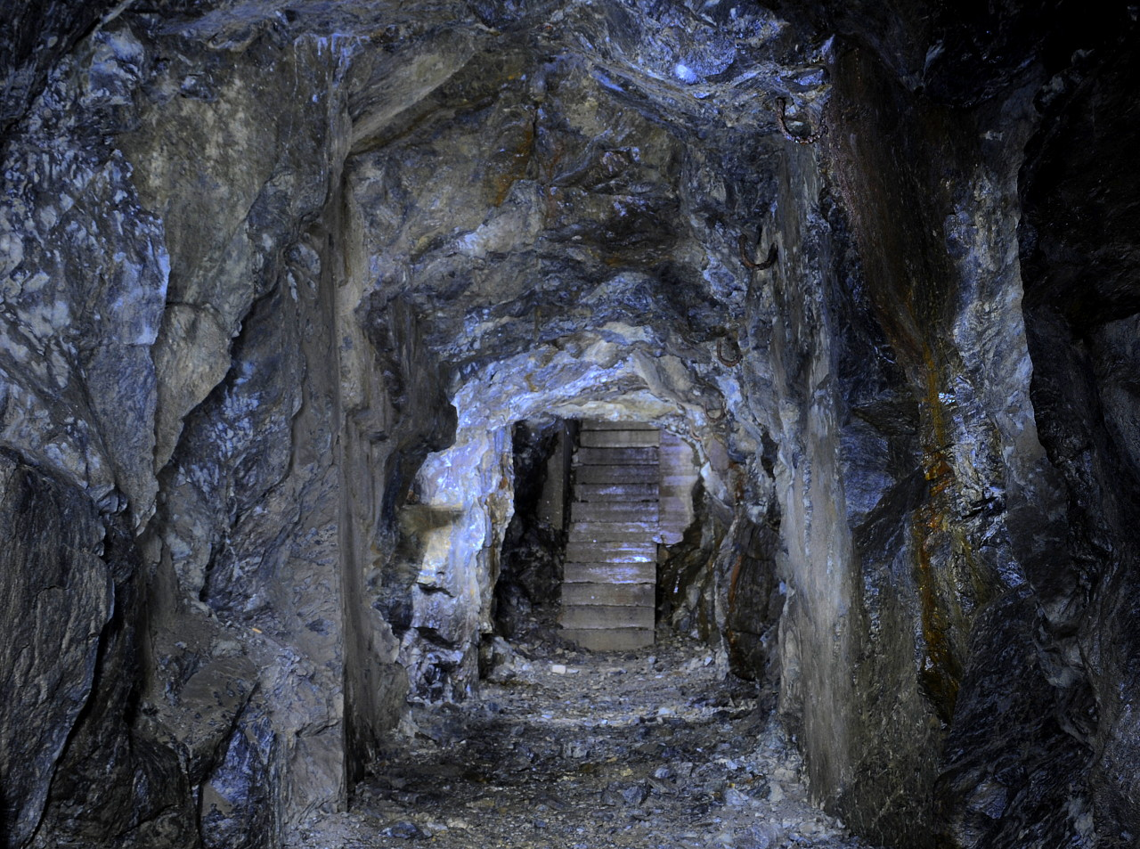 Frittstående fjellanlegg, med tunnelsystem som sammenkobler en rekke nærforsvarsstillinger